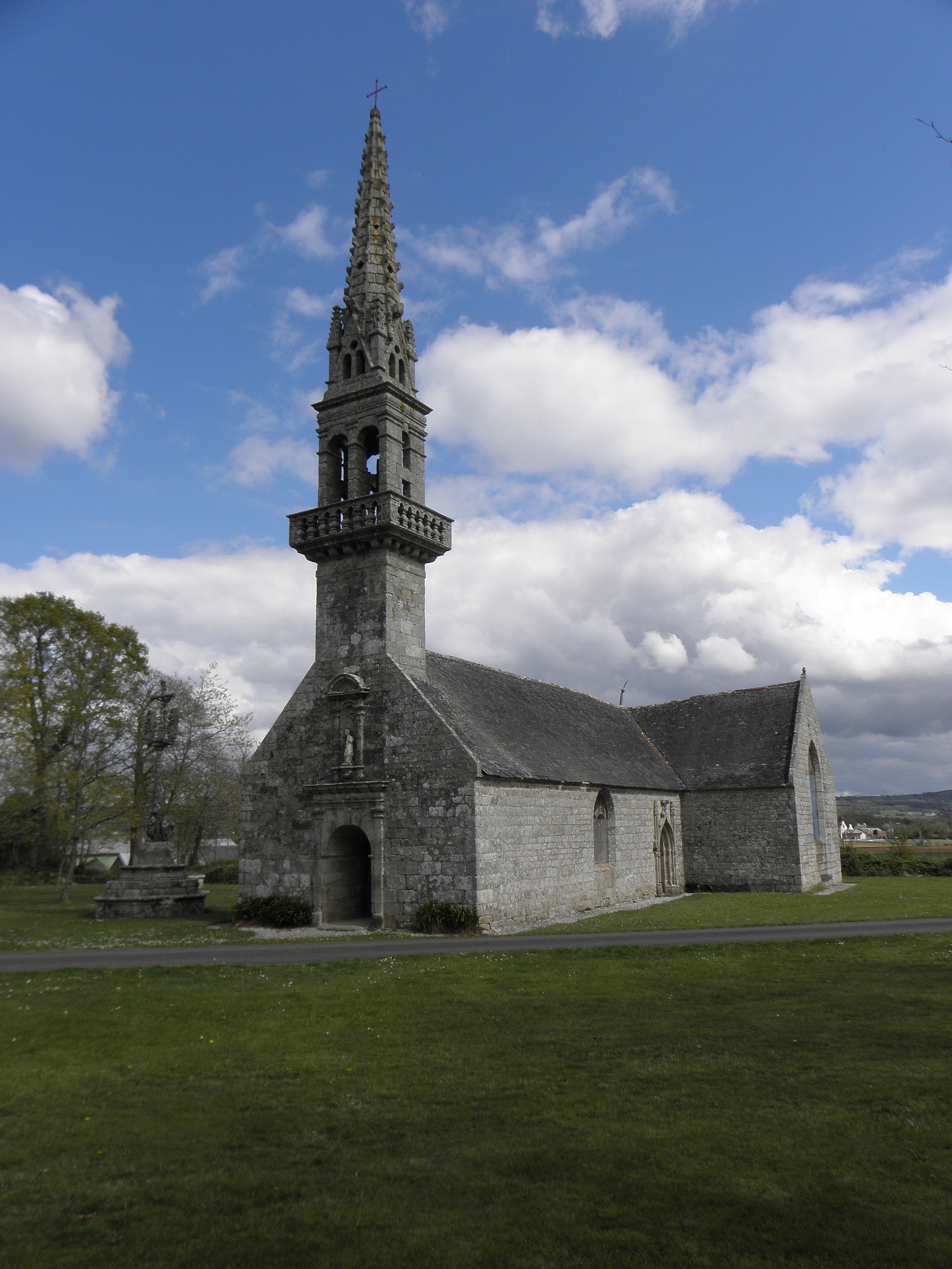 Chapelle N.D. de Bonne Nouvelle de Quillidoaré en Cast (29).